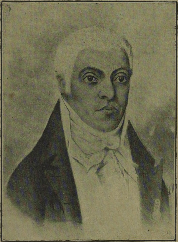 Desembargador brasileiro (1758-1821) Judge of Brazil